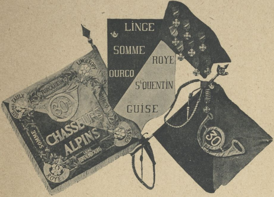 FANIONS DU 30e BATAILLON DE CHASSEURS ALPINS. Le fanion de guerre, déchiré par des éclats d'obus aux attaques du Linge. Le fanion offert par le Dauphiné, « République de l'Isère », en décembre 1918.